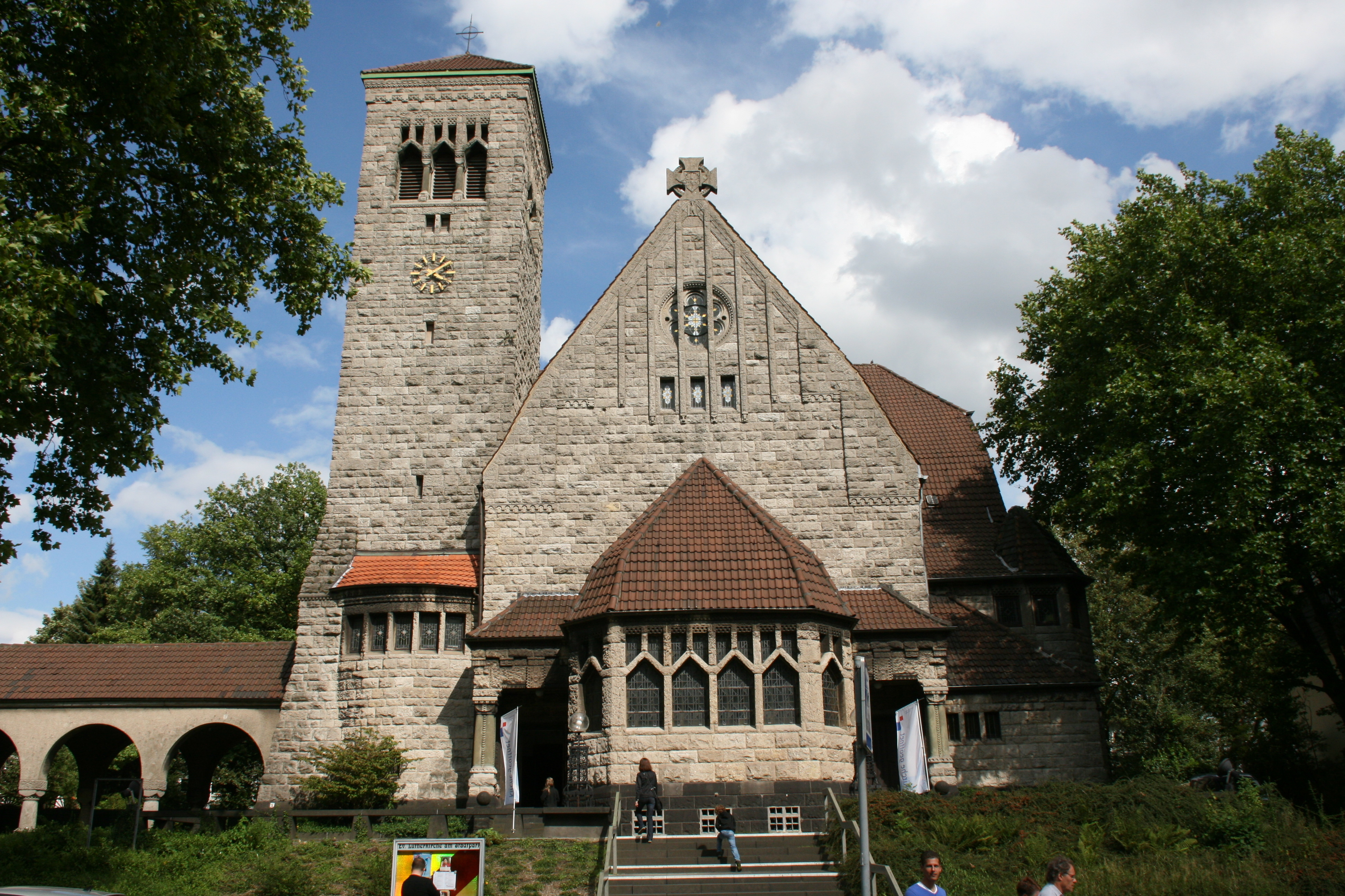 Lutherkirche, Klinikstraße 10 in Bochum